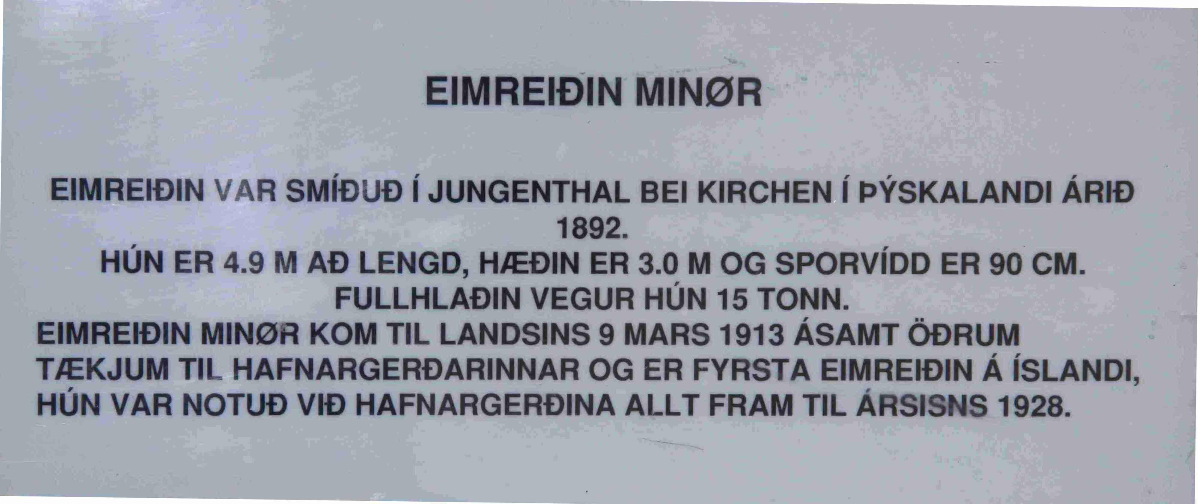 Tafel an der Minoer in Reykjavik